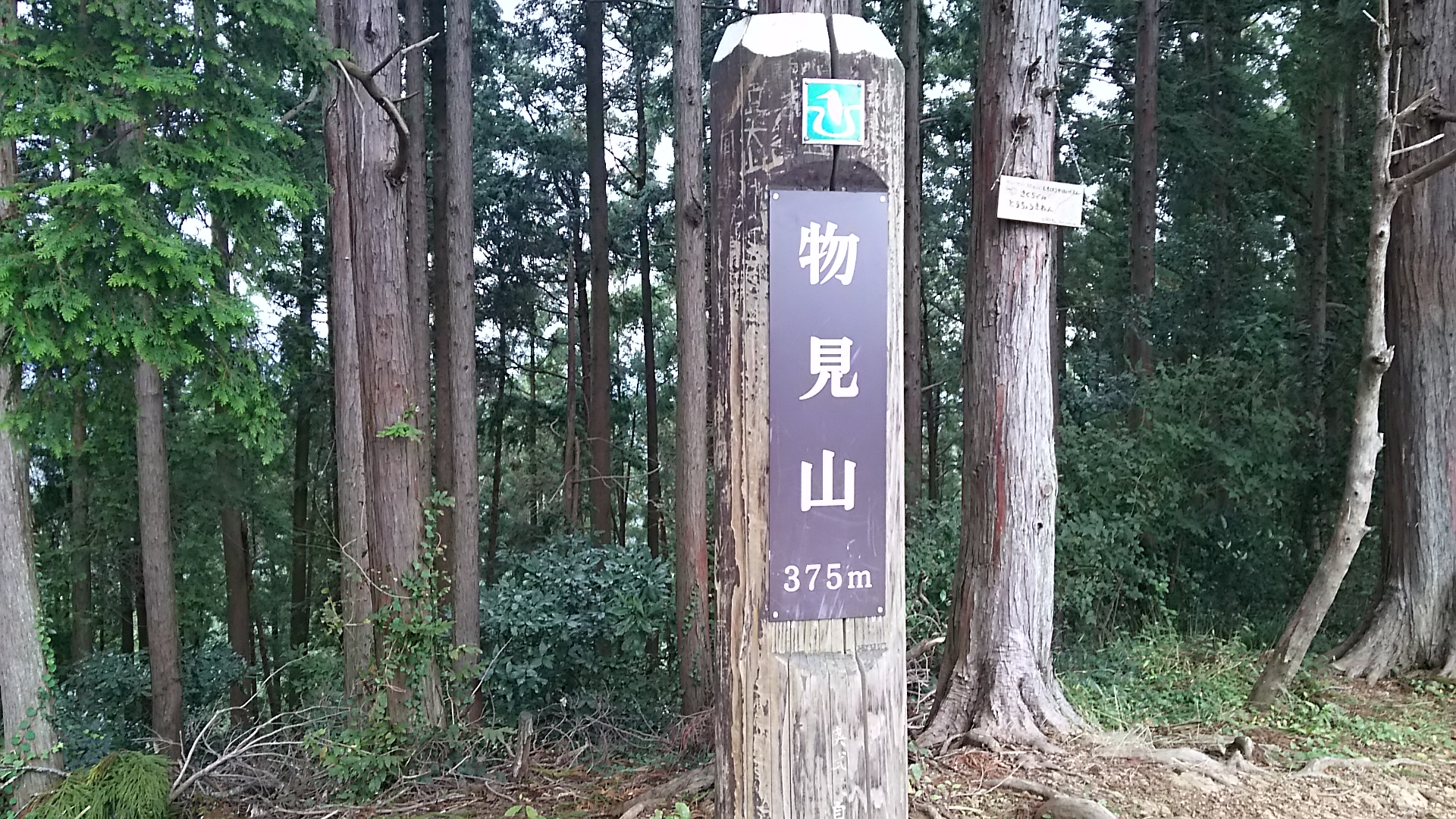 物見山山頂標